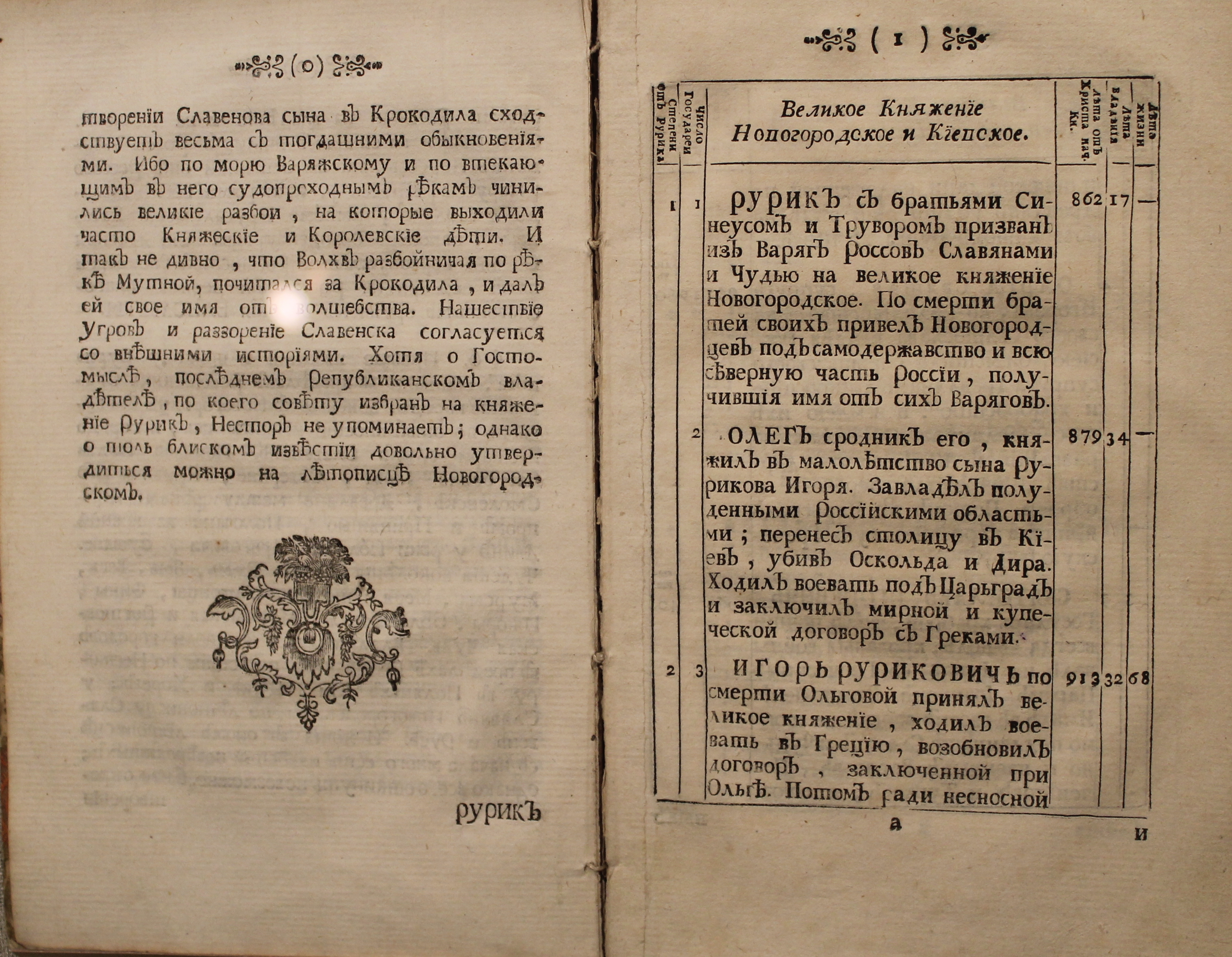 Ломоносов. Краткий Российский летописец с родословием. СПб, 1760